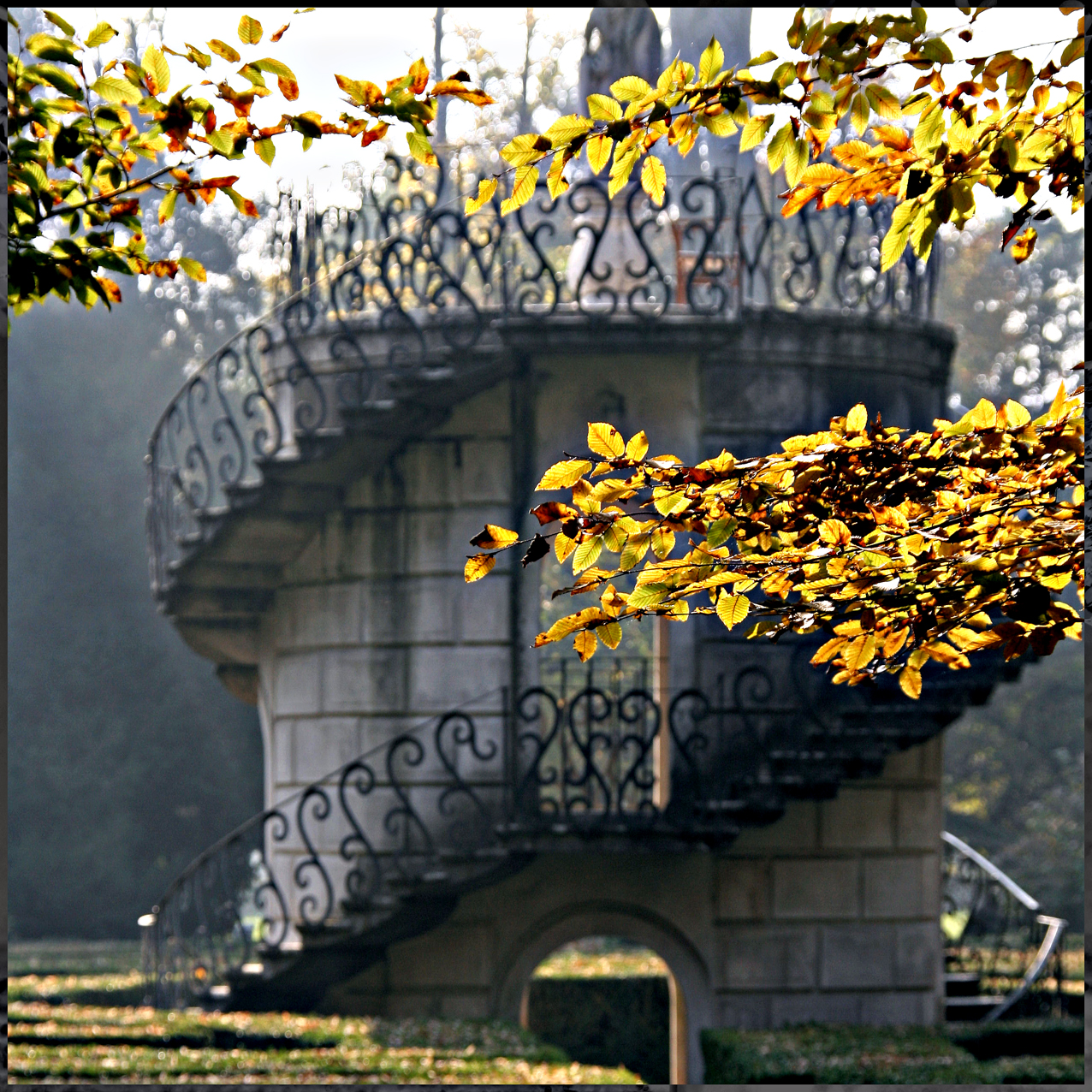 Belvedere del labirinto della villa Pisani a Stra.